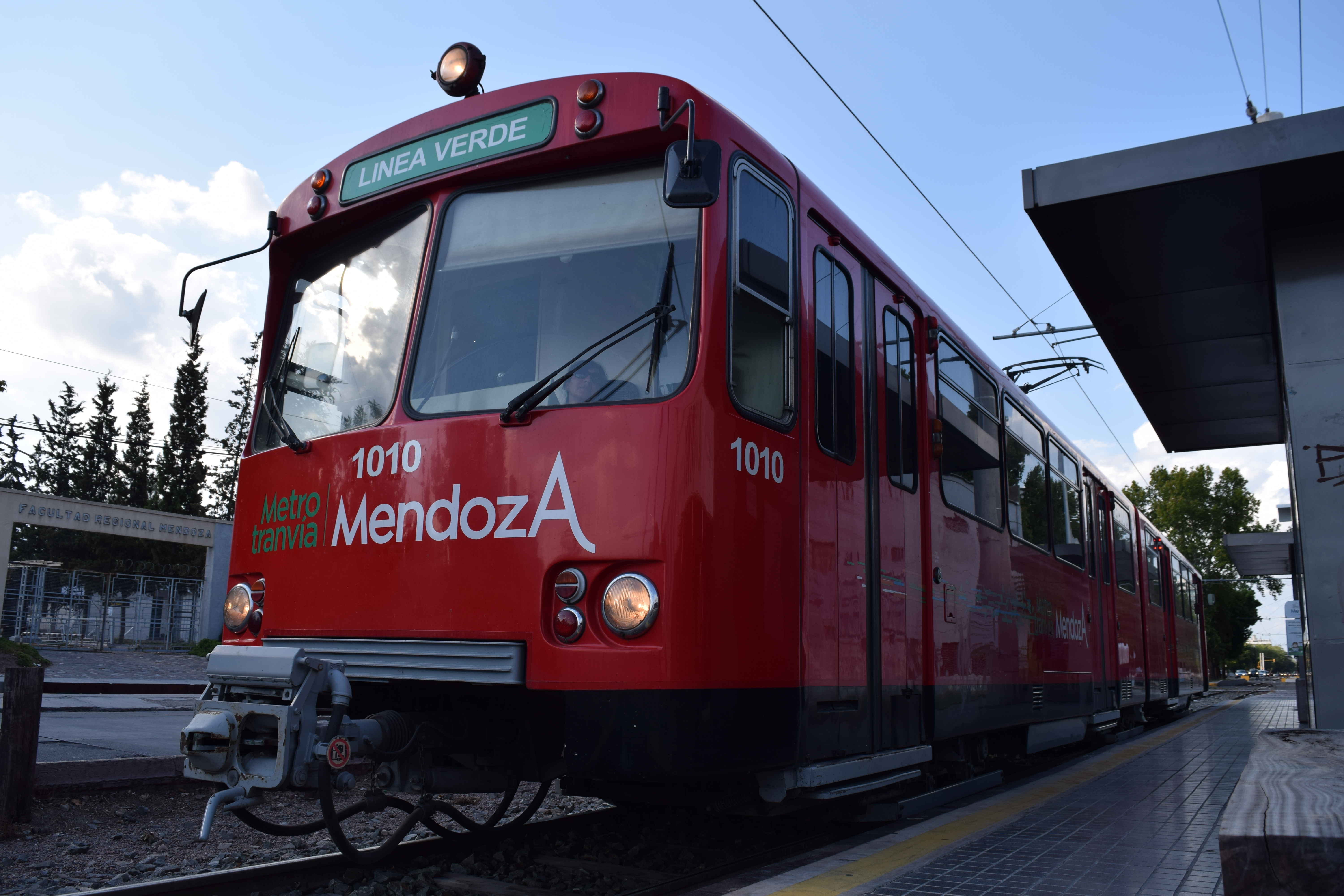 Coche Siemens Duewag detenido en el parador Pedro Molina del Metrotranvía de Mendoza con destino a la estación Gutierrez.